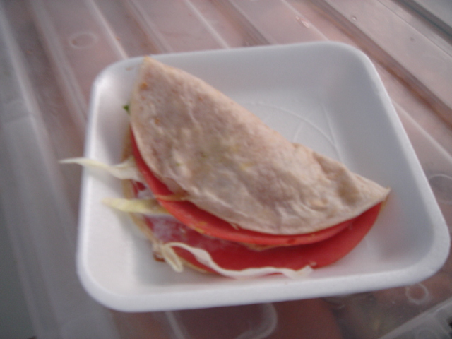 Quesadilla de tortilla de harina con queso y jamón también llamada sincronizada.